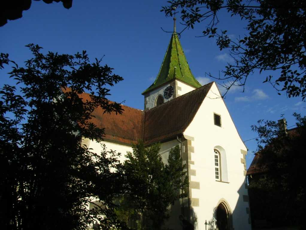 Kirche von Kilchberg Tübingen